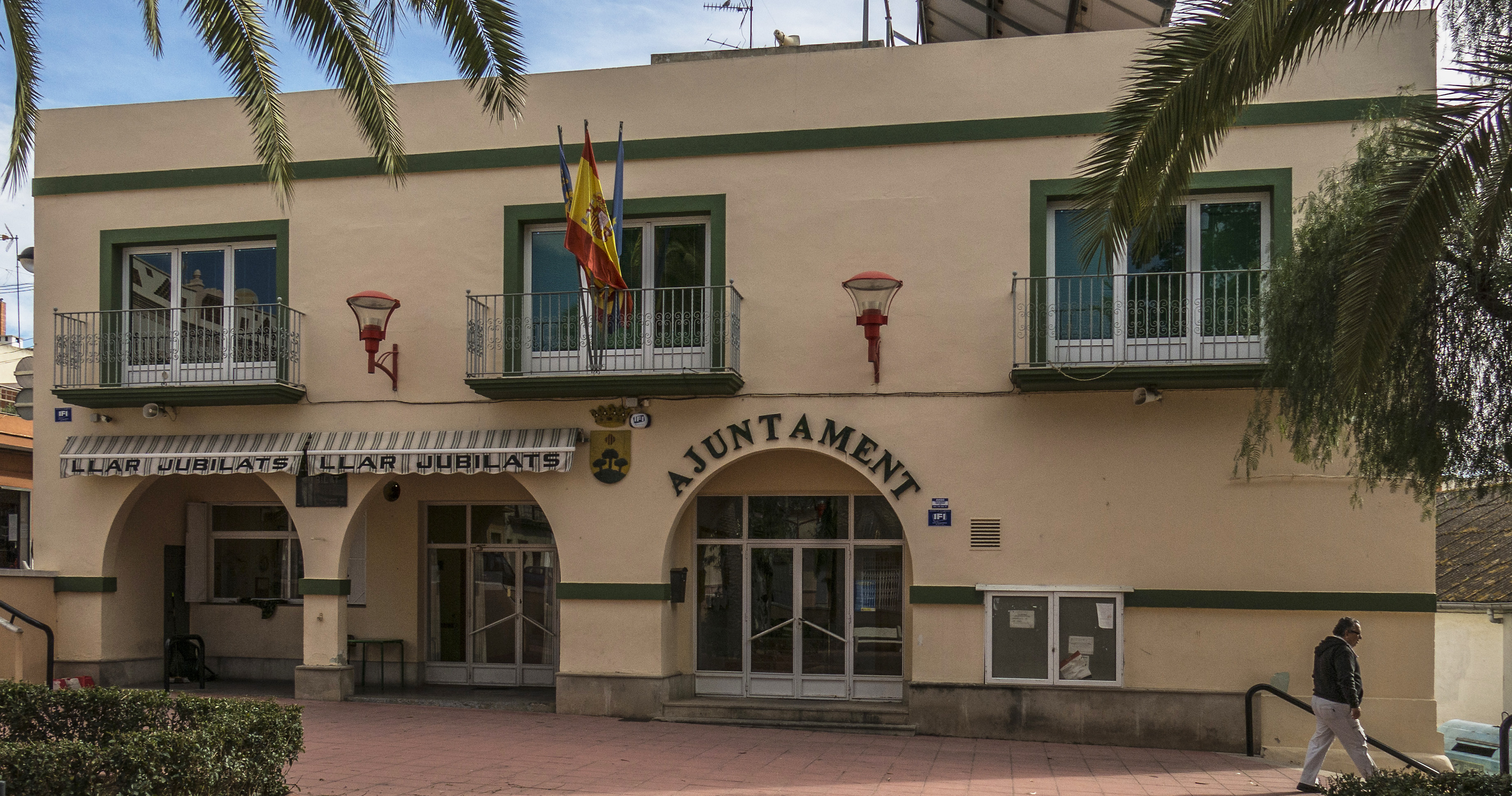 Benicull de Xúquer és un municipi valencià que es troba a la comarca de la Ribera Baixa. Limita amb Corbera i Polinyà de Xúquer (a la mateixa comarca); i amb Alzira (a la comarca de la Ribera Alta). Aquesta imatge ha sigut publicada en: País Valencià poble a poble, Benicull, 11-03-2018